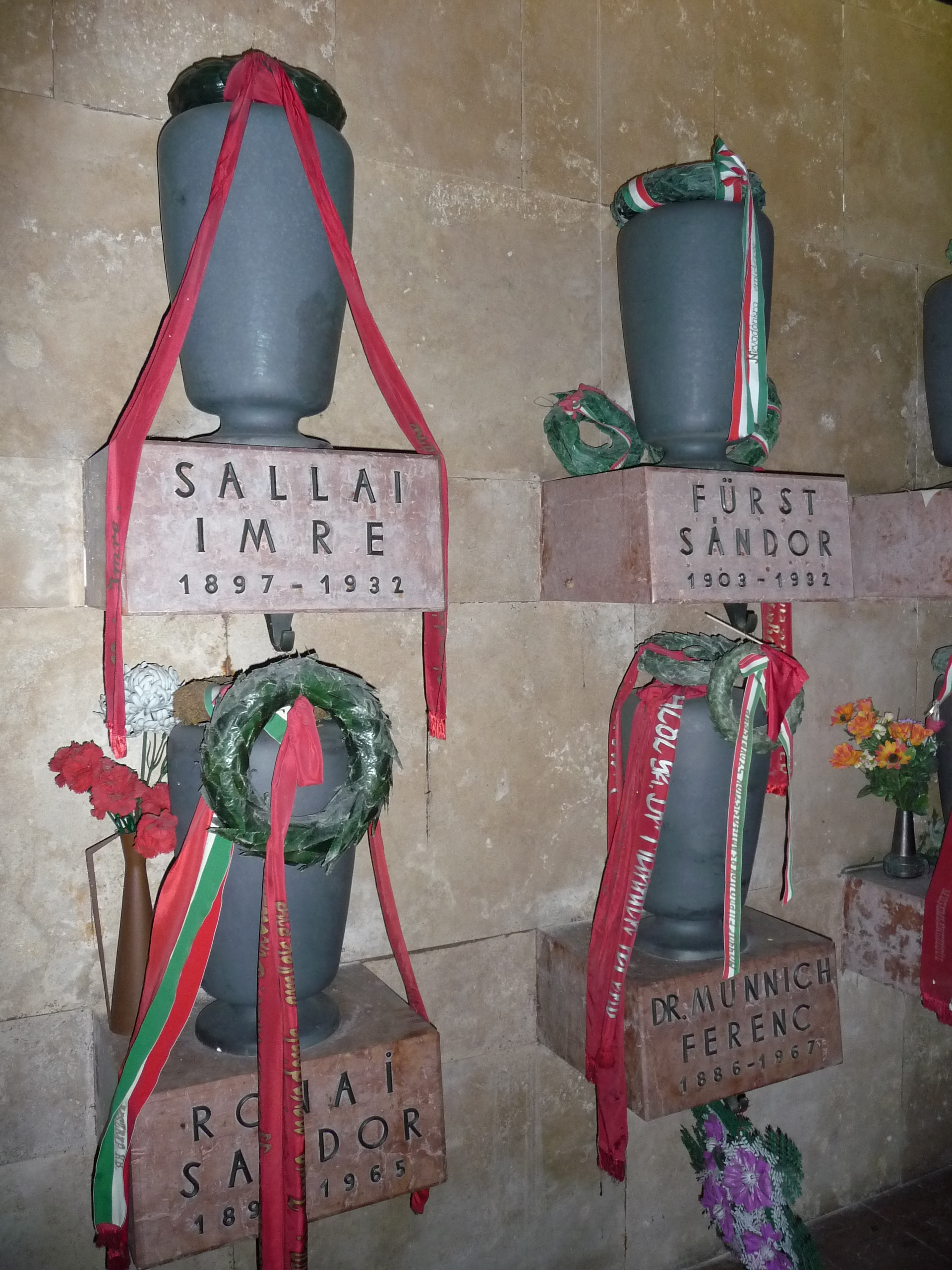 a temető egész területe az állami tulajdonú védett síremlékekkel együtt This is a photo of a monument in Hungary. Identifier: 90002